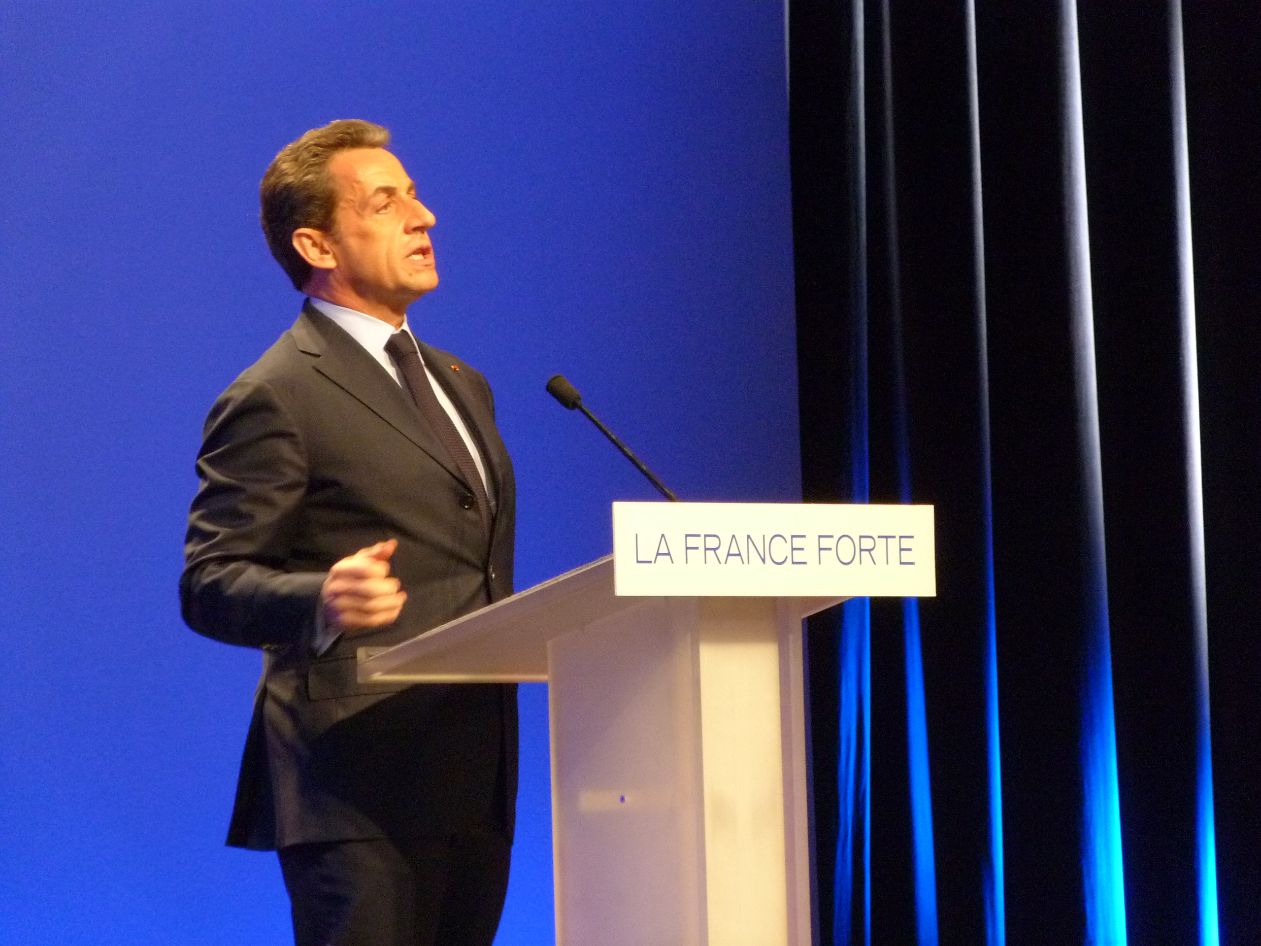 Meeting du 2 avril 2012 à Nancy